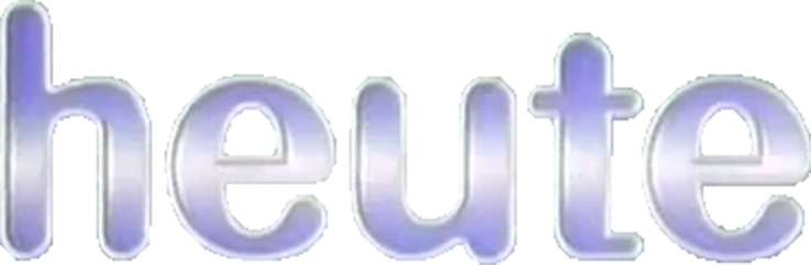 Logo der ZDF-Nachrichtensendung heute von 1990, verwendet innerhalb des Vorspanns der Jörg Knör Show vom 6. September 1990